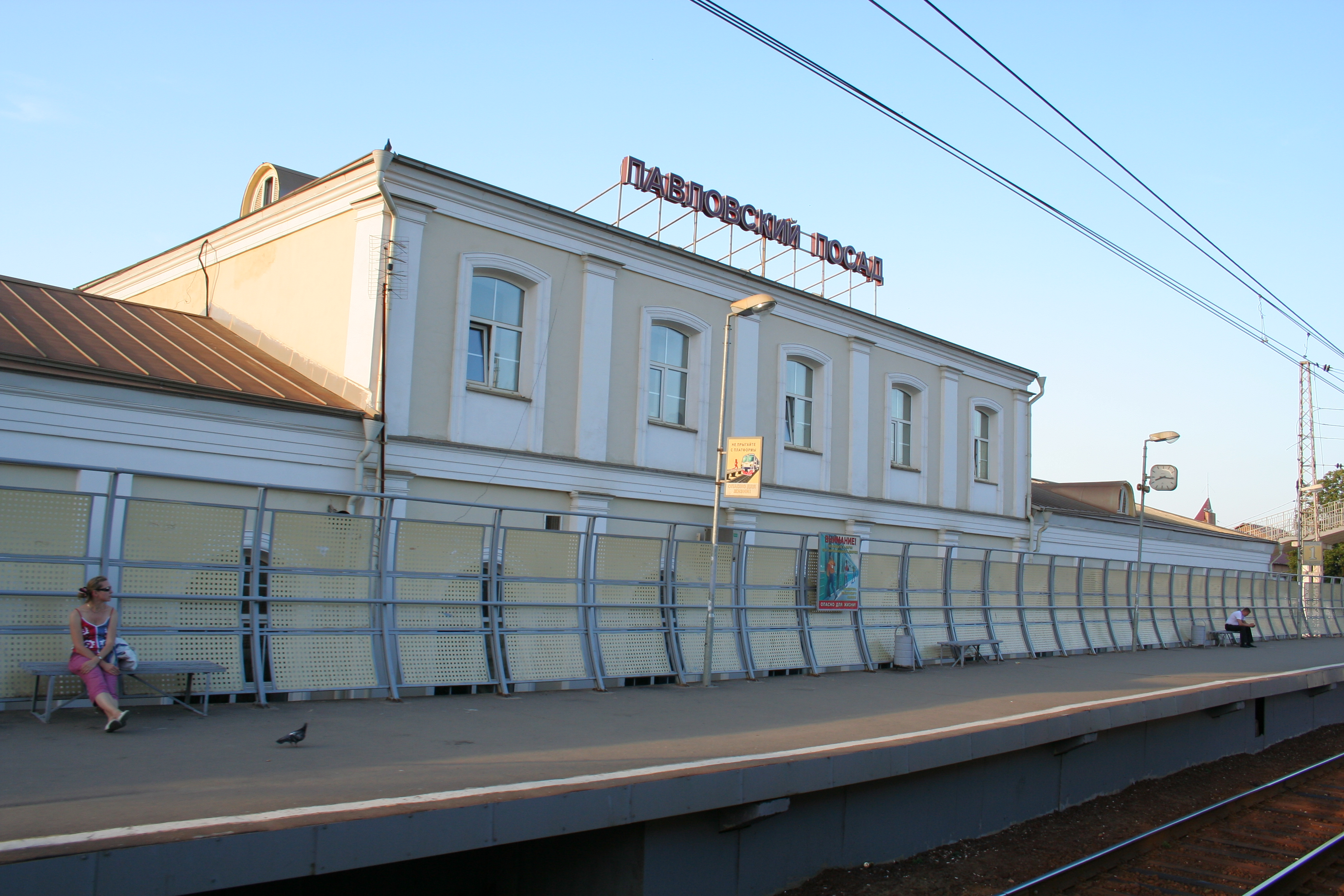 Regionalbahnhof der Stadt Pawlowski Possad, Oblast Moskau, Russland.